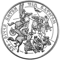 Coin for 350 years of битви під Батогом